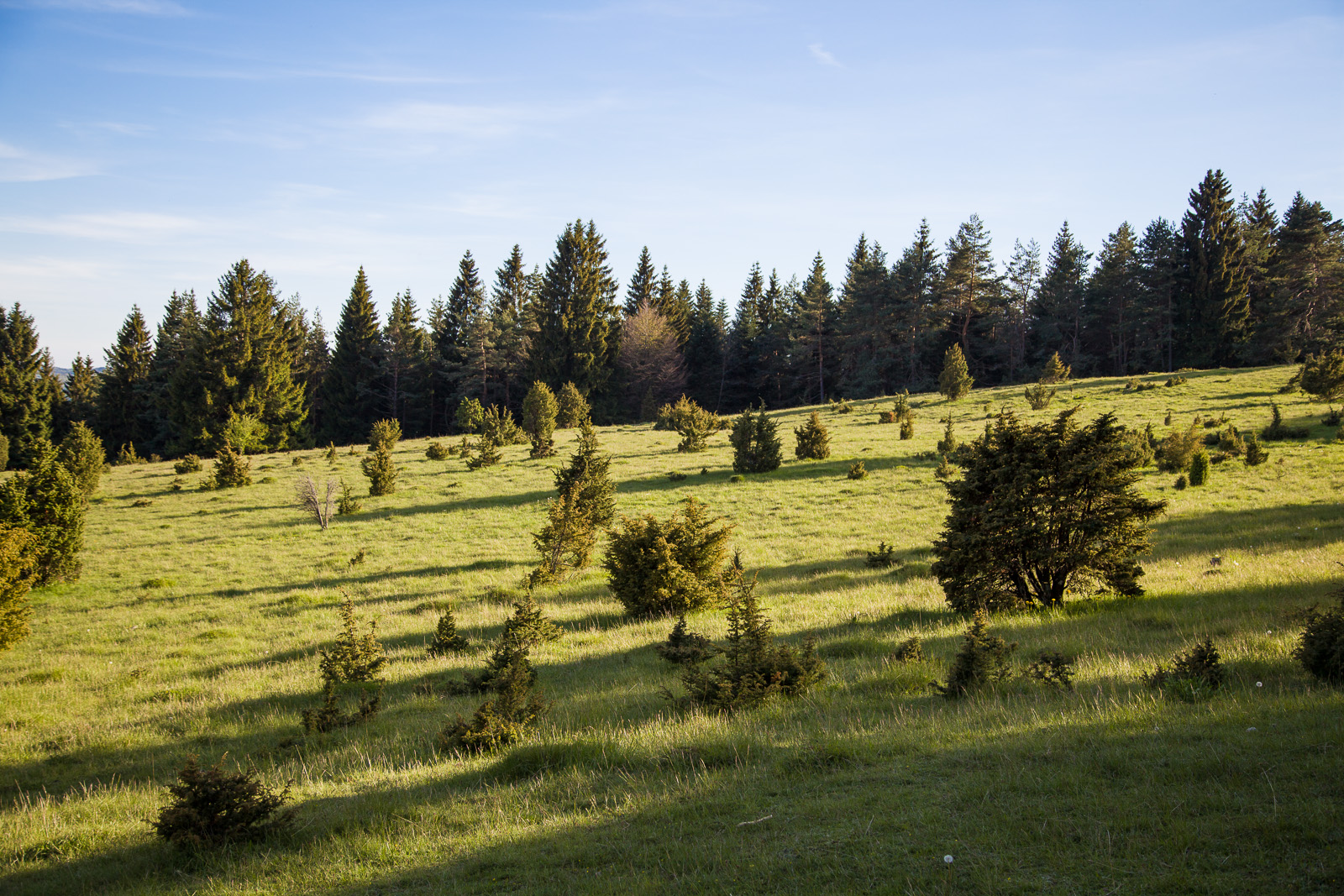 Wacholderheide im Sonnenuntergang auf dem Schafberg im Kreis BL, Naturschutzgebiet-Nummer: 4.245